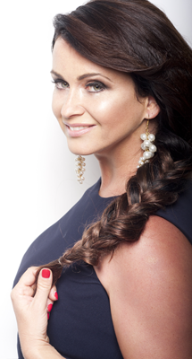 Petra Řehořková, osobní fotografie